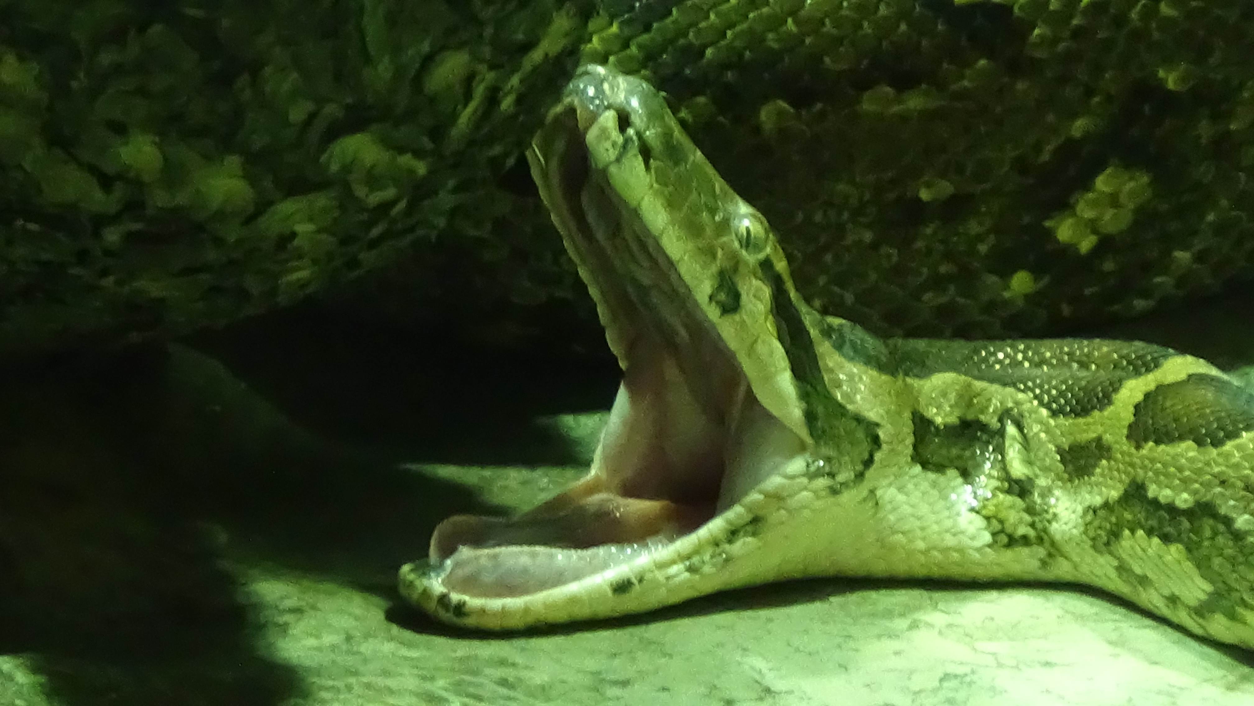 Python molurus - ménagerie du Jardin des plantes - Paris, Ile de France, France